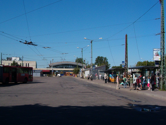 Harjumaa linnalähibussiliinide peatused